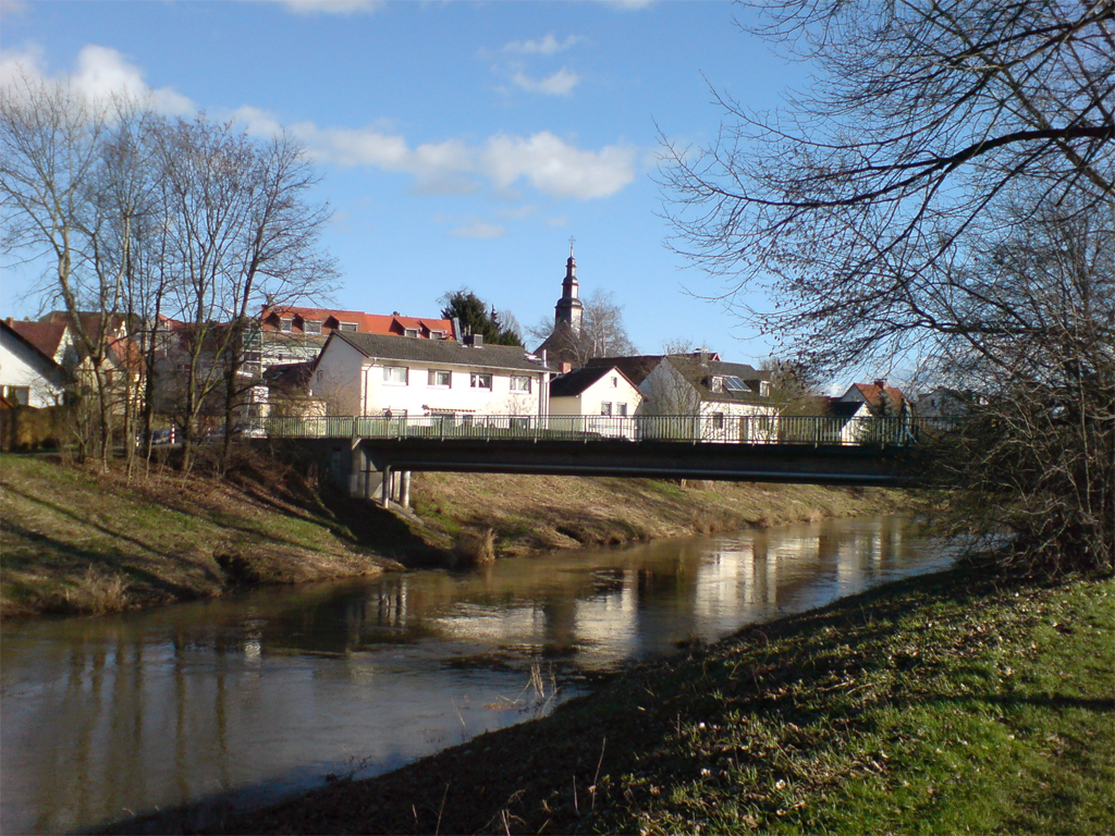 Nidda in Bad-Vilbel-Dortelweil